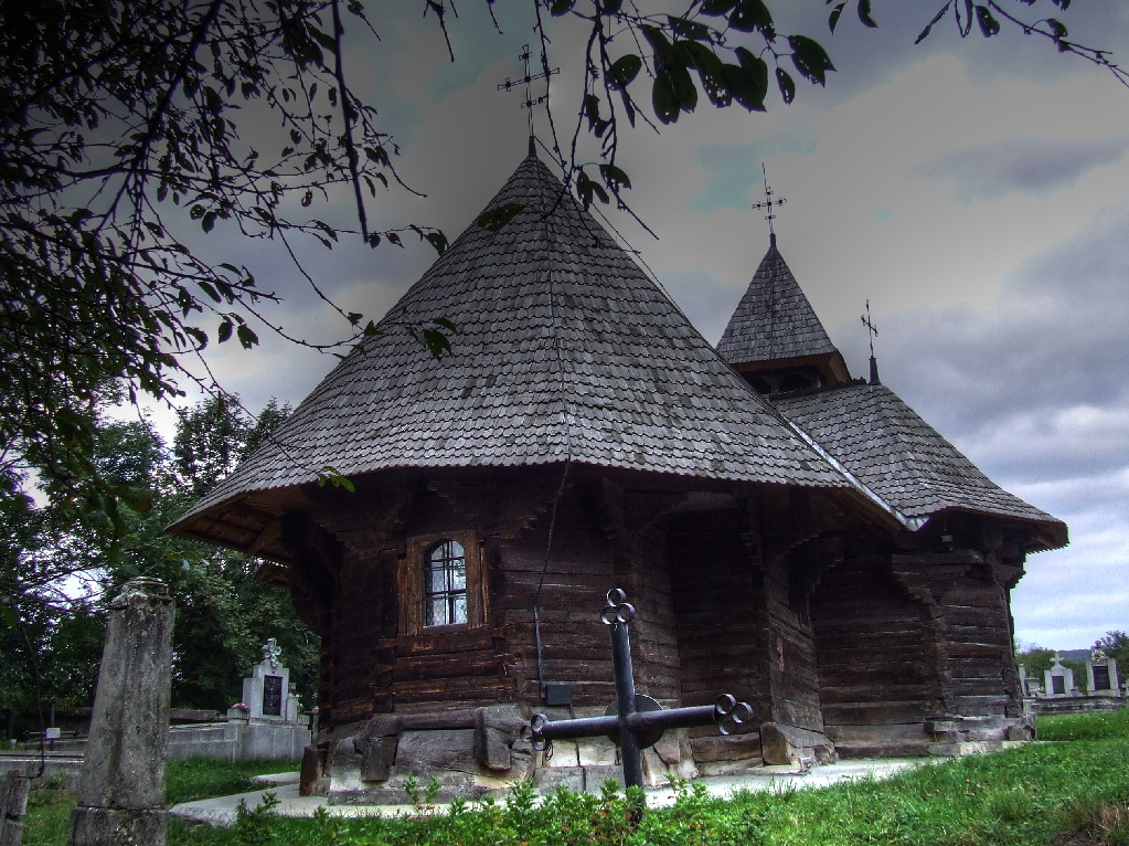 Biserica de lemn din Reghin, vedere din nord-vest.